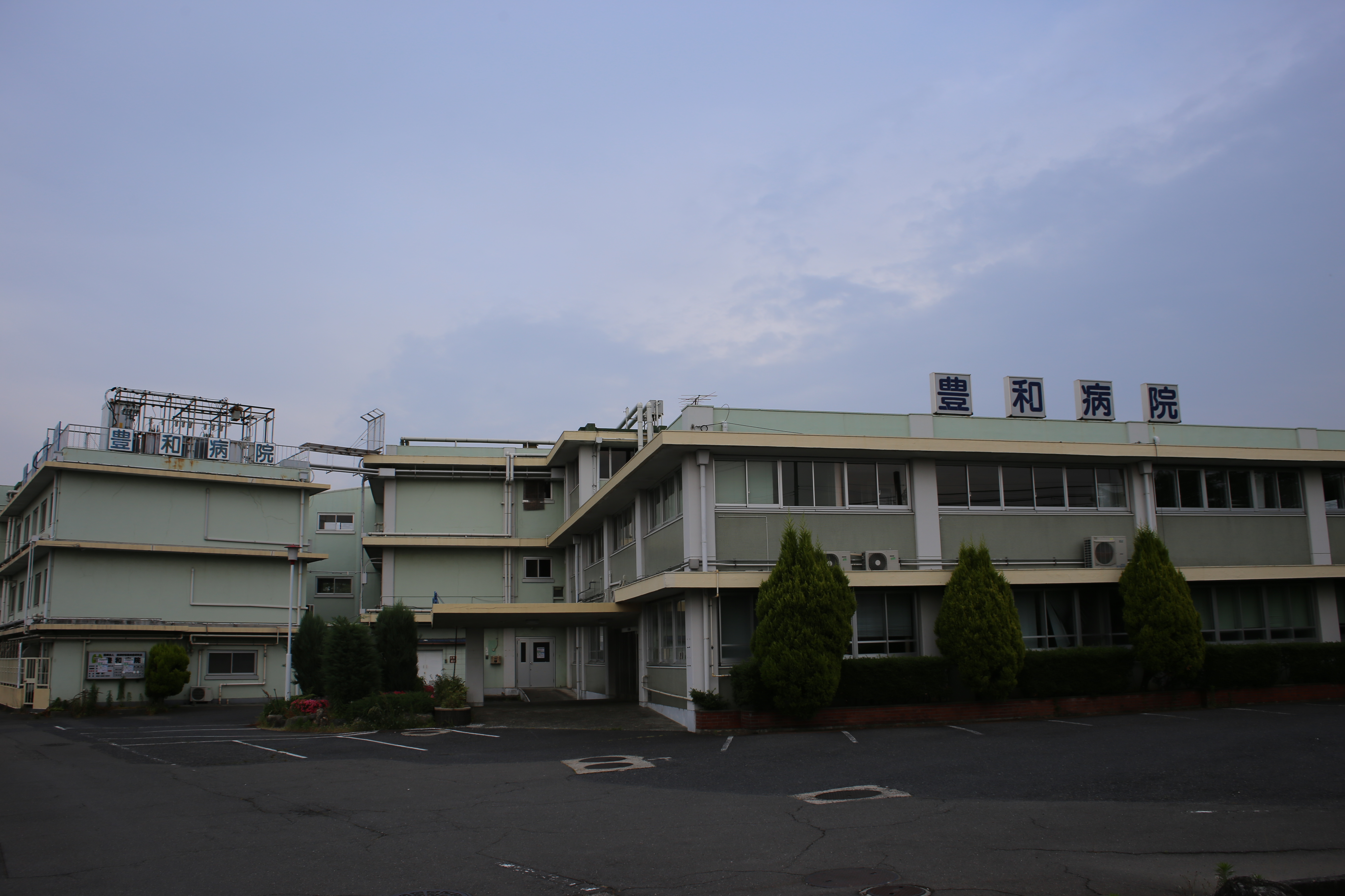 愛知県清須市須ケ口の豊和病院を北側公道東側より撮影